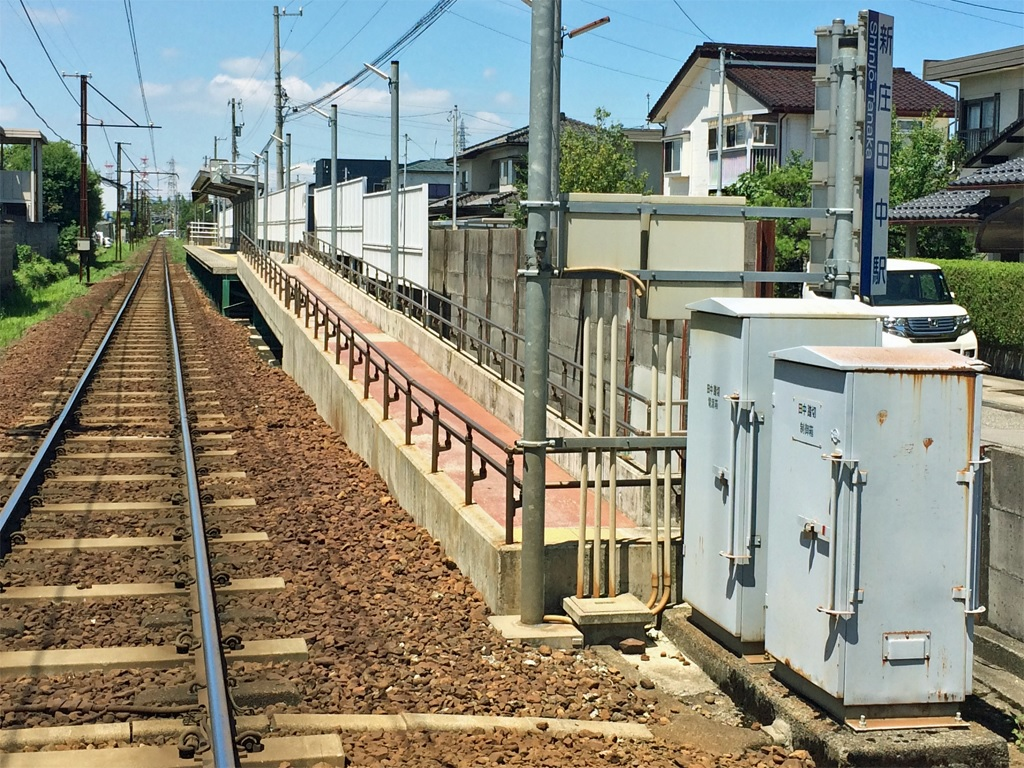 富山地方鉄道本線 新庄田中駅